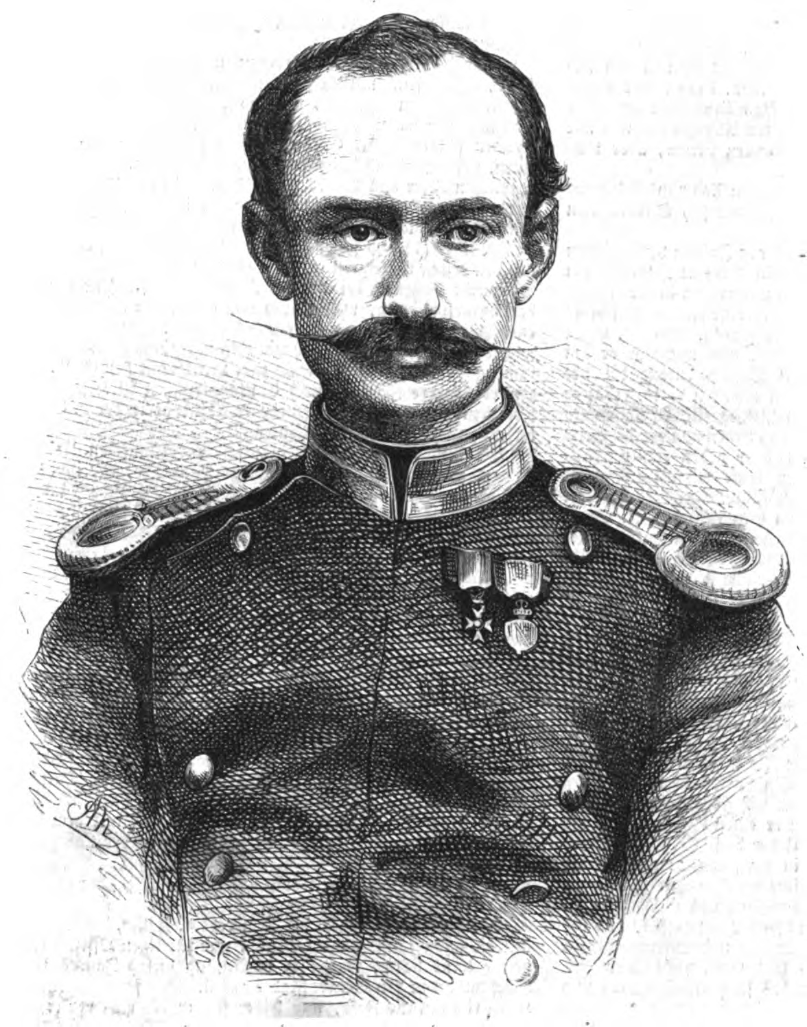 Eduard Schlagintweit, bayerischer Offizier im 19. Jh.